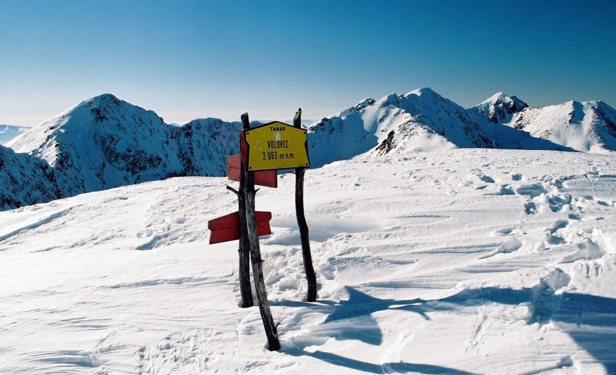 Na szczycie Wołowca. W tle Rohacze. Zdjęcie wykonane w styczniu 2006 roku